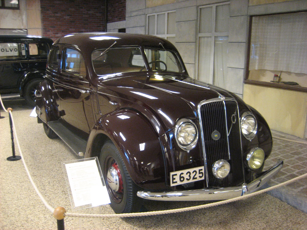 Volvo Carioca PV36 from the Volvo museum.